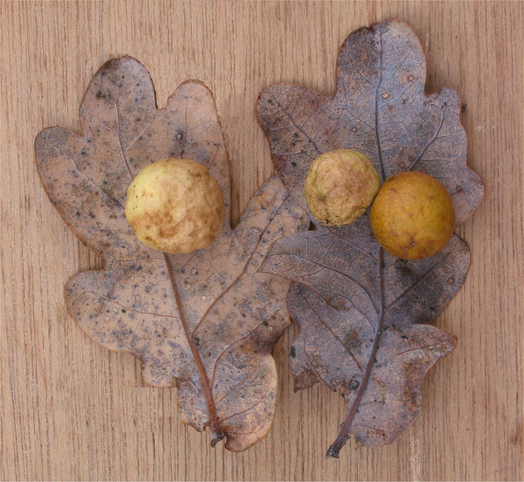 (Gallen Eikengalwesp) Cynips quercusfolii